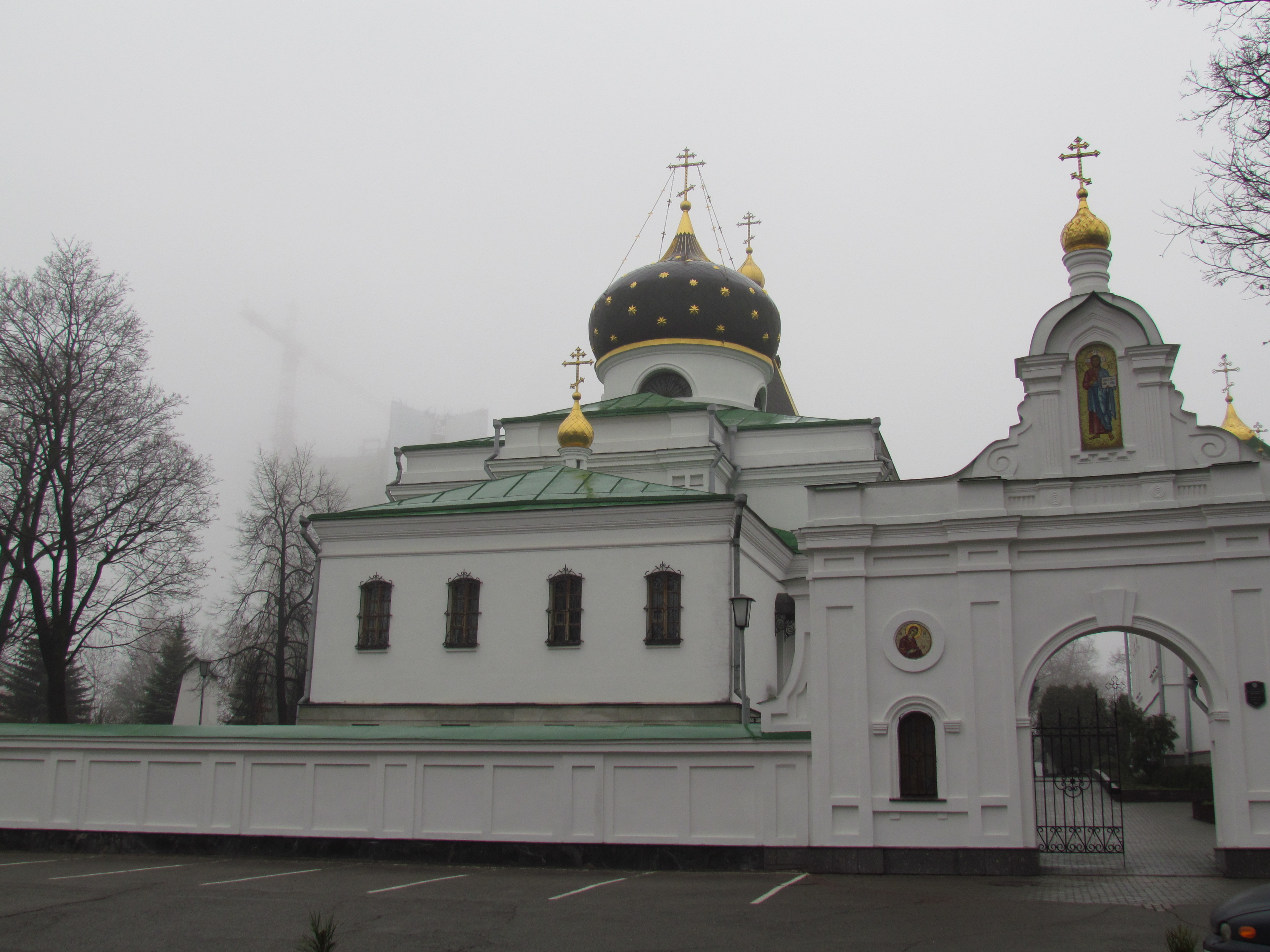 Minsk after the freezing fog